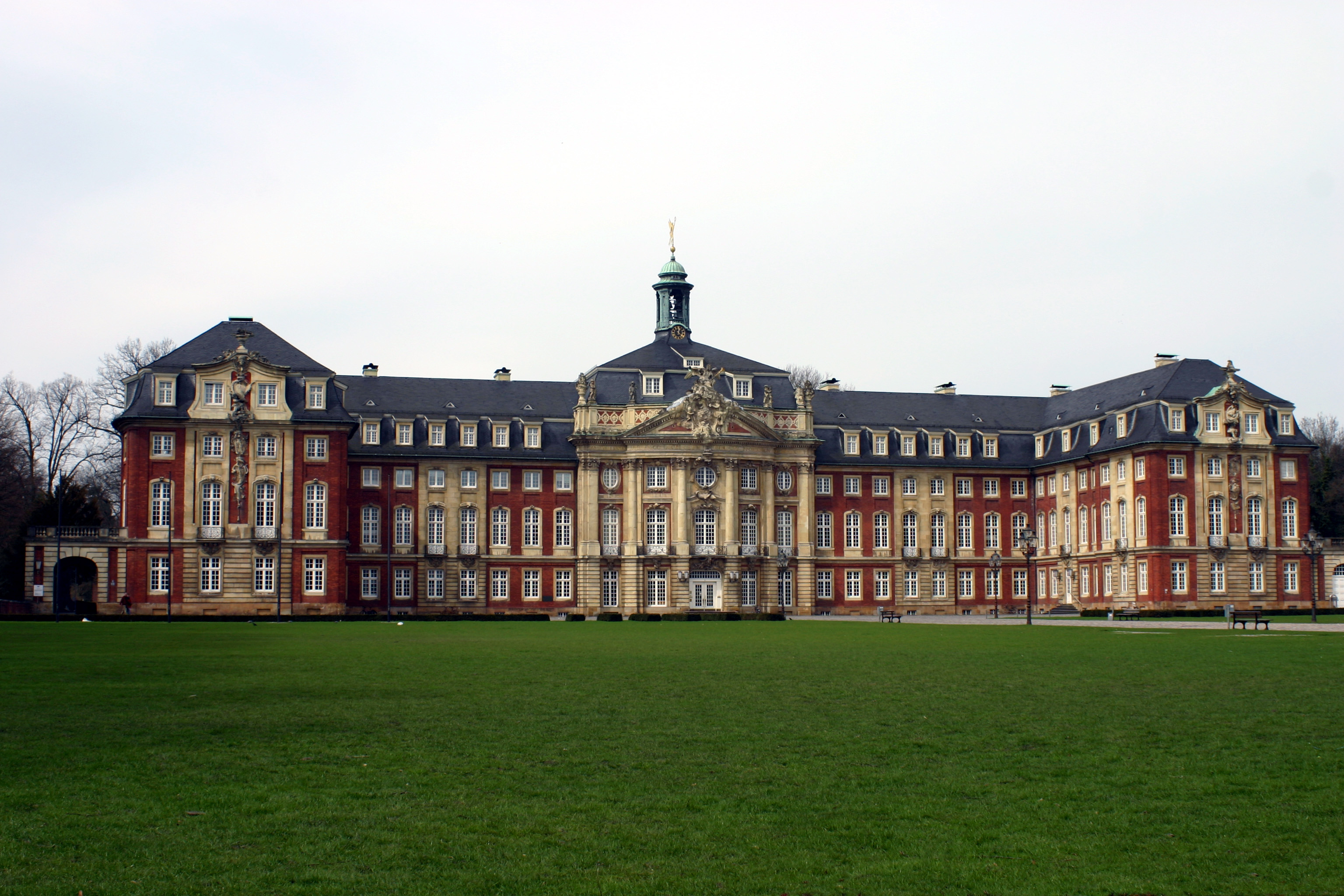 Münster - Das Schloß